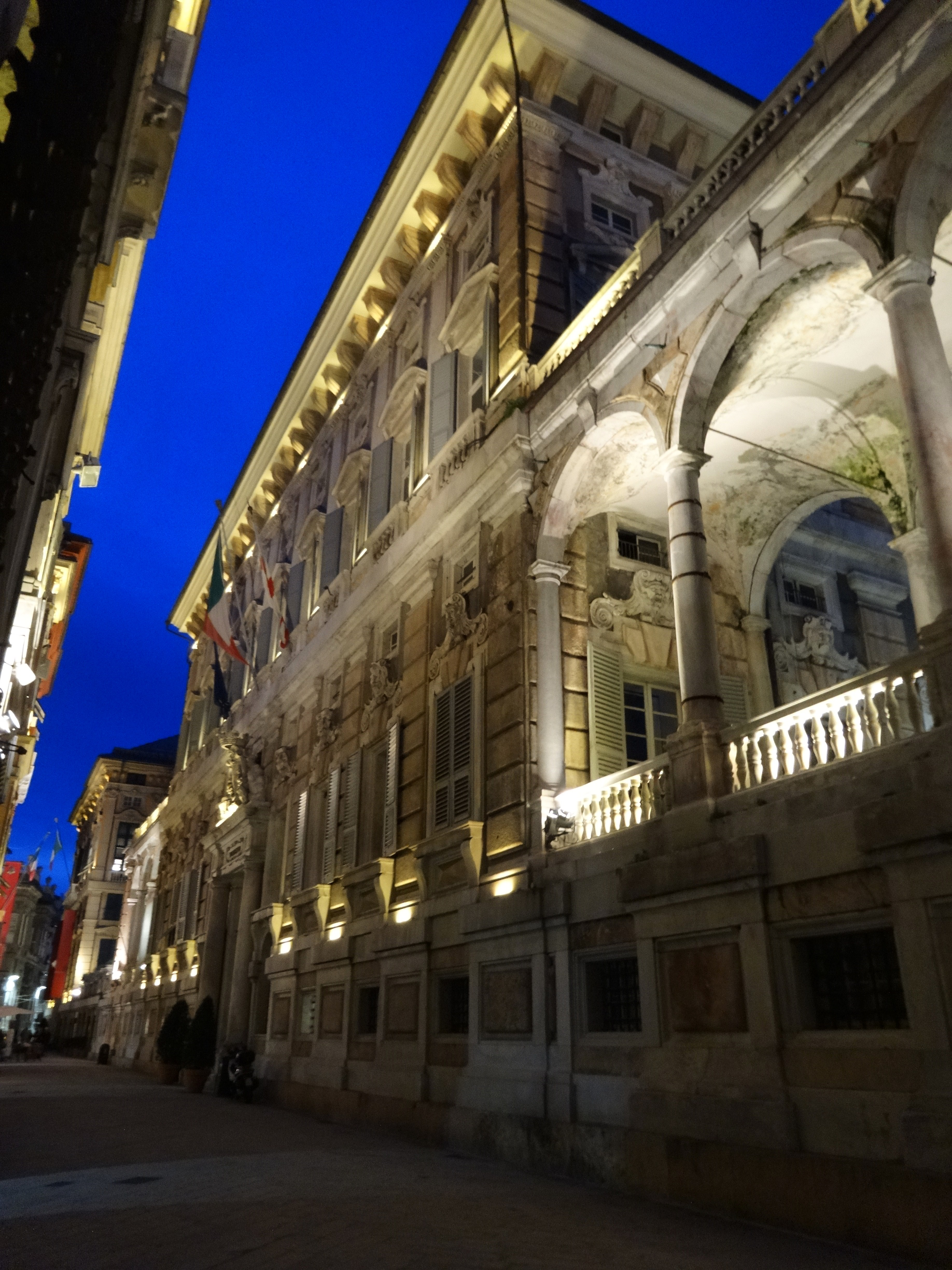 Palazzo Doria-Tursi - Musei di Strada Nuova This is a photo of a monument which is part of cultural heritage of Italy.